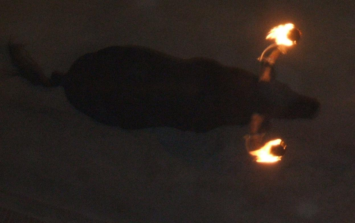 Toro embolado. Fiestas Puzol. Barrio de la Avenida